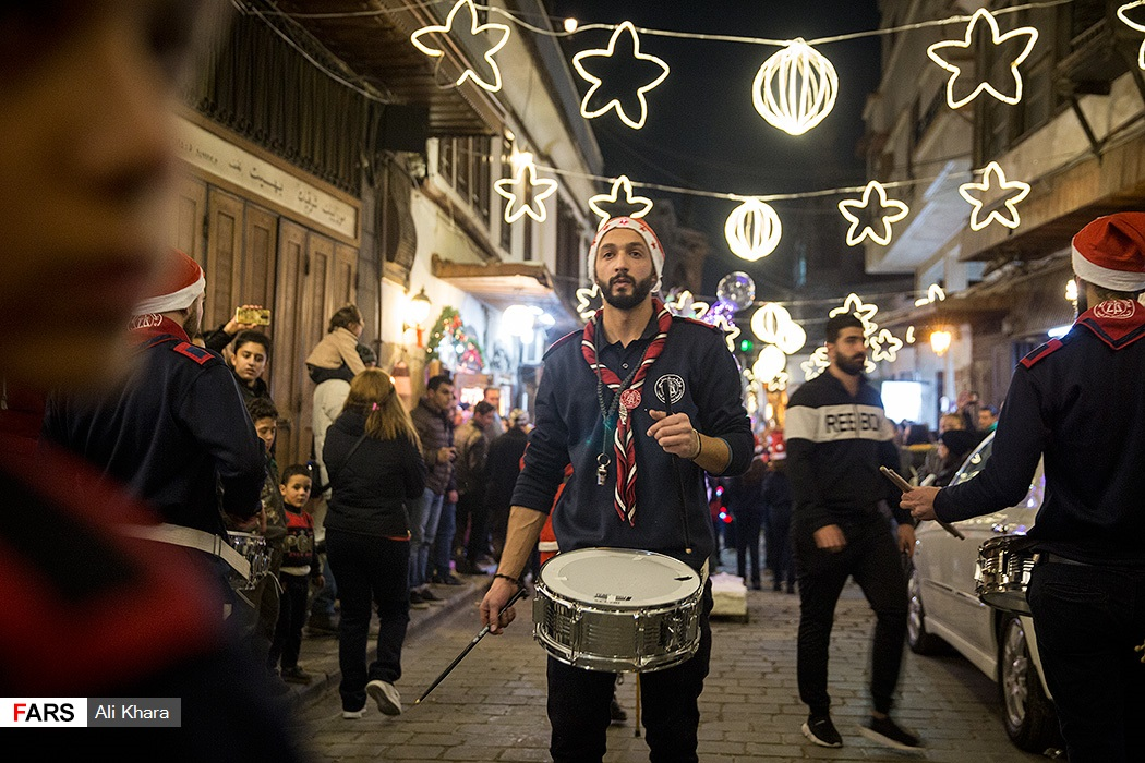 کارناوال کریسمس در اولین کریسمس آرام دمشق پس از ۷ سال جنگ/ خیابان المستقیم دمشق